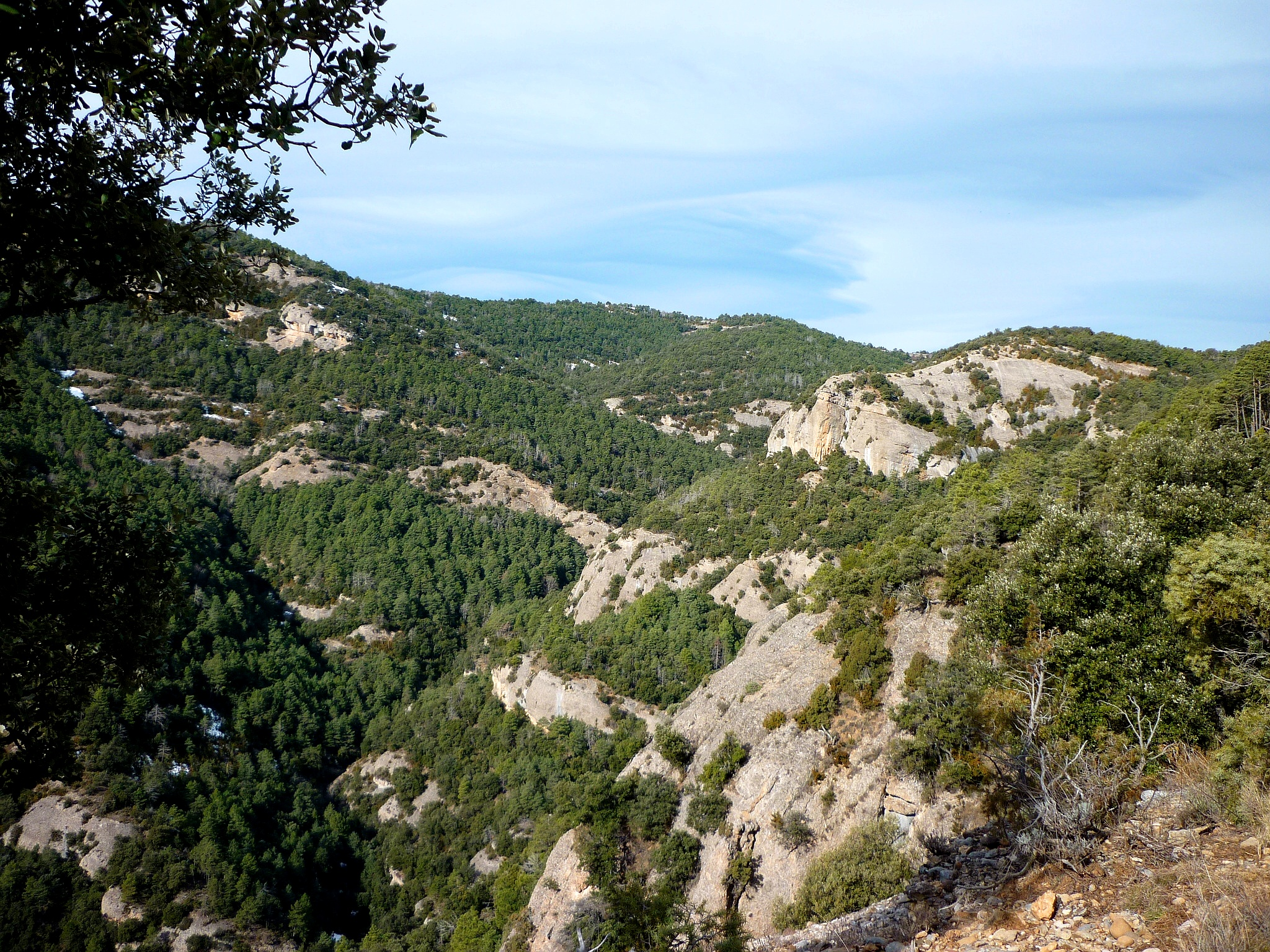 Capçalera de la Rasa de Torrenteller des de la Rua de la Corrua. Lladurs (Solsonès - Catalunya)